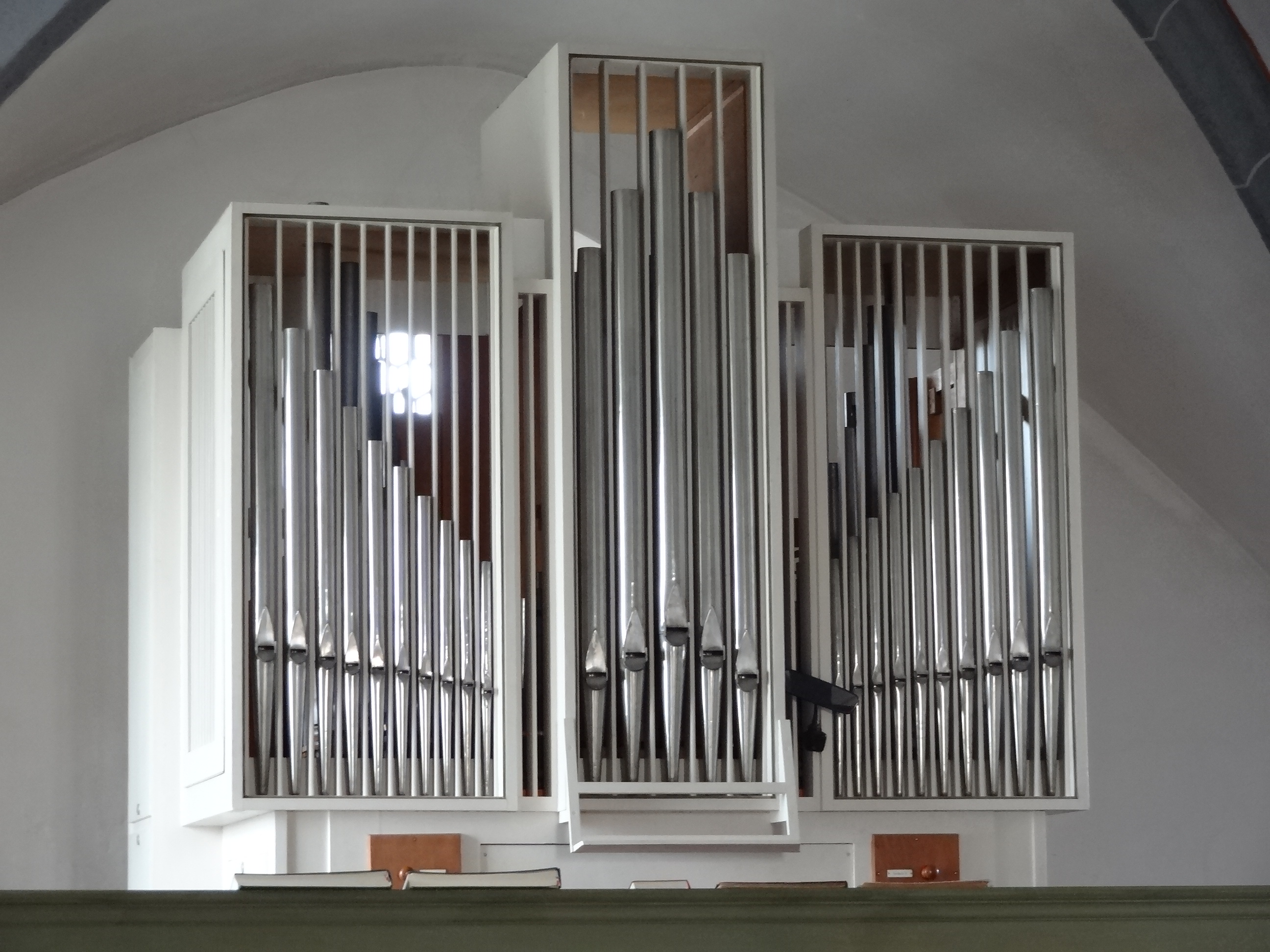 Evangelische Kirche Muschenheim